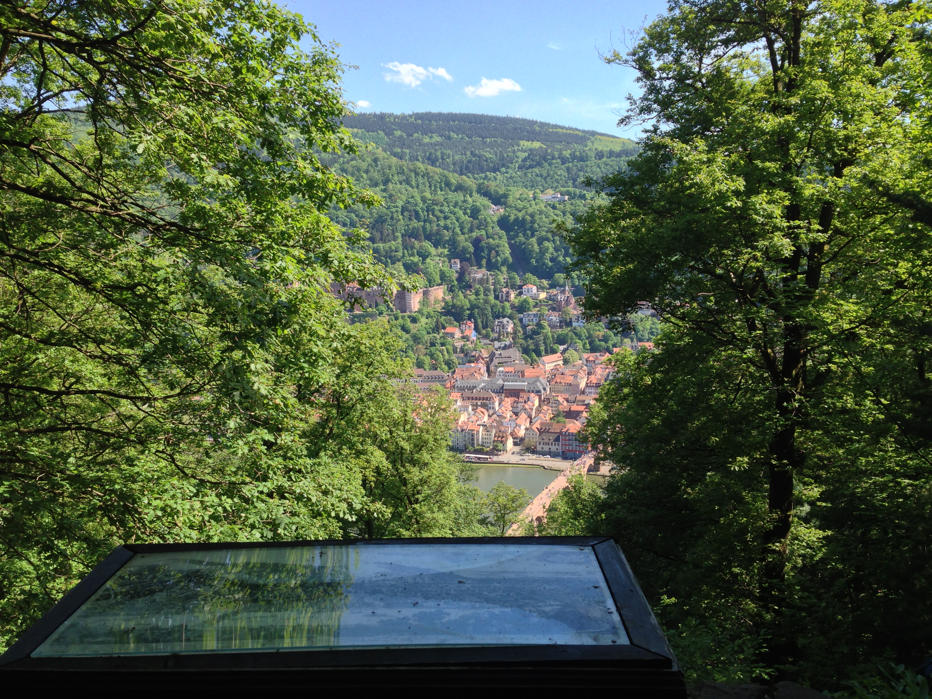 Blick auf Heidelberg von der Meriankanzel aus